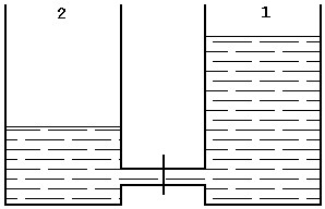 Prosty schemat naczyń połączonych.